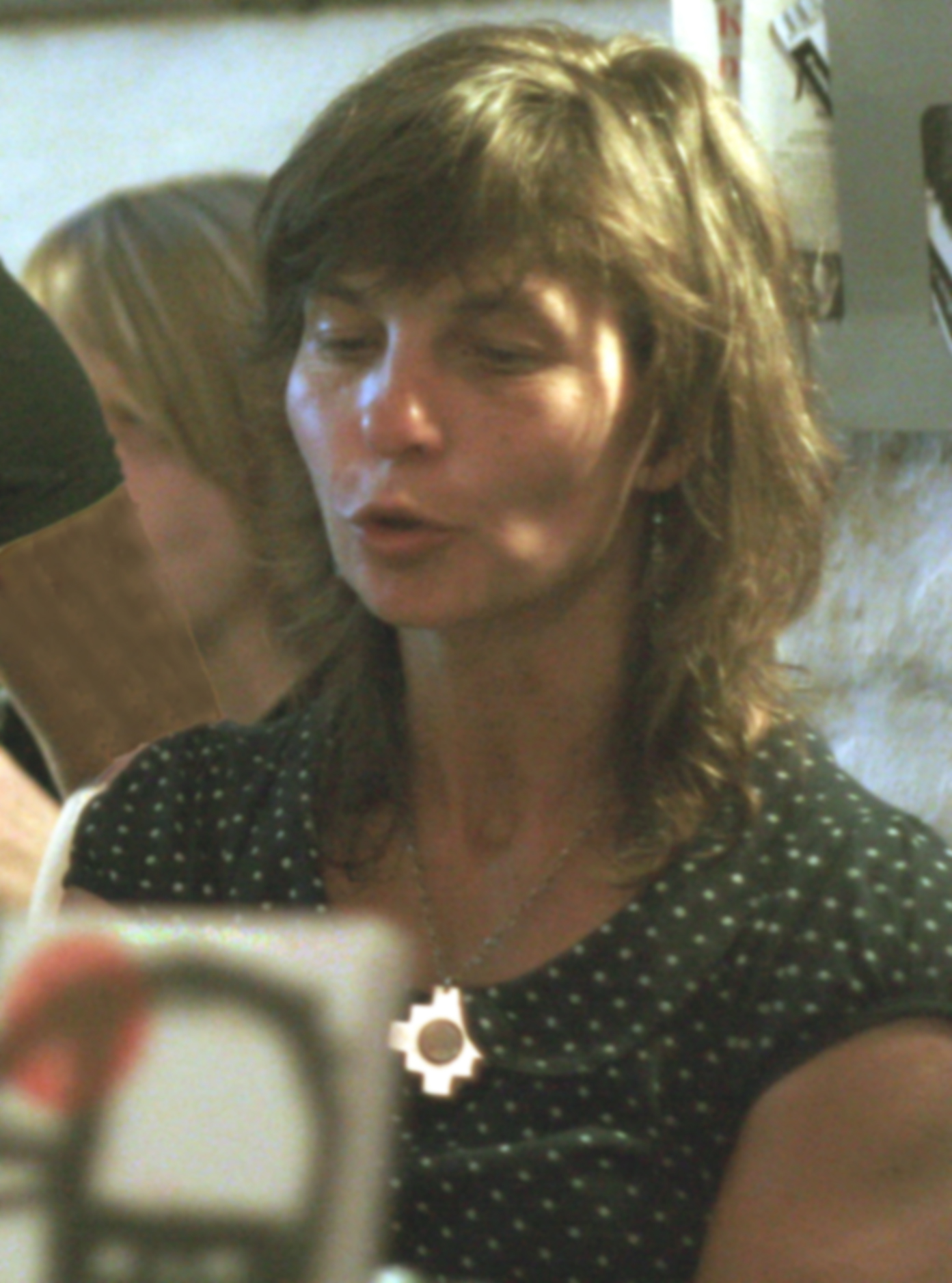 Anežka Charvátová překladatelka